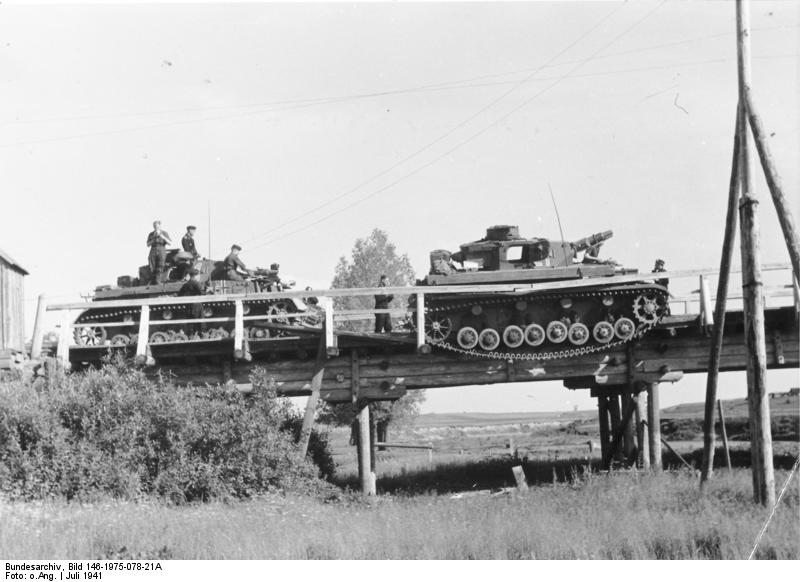 Schwerer deutscher Pzkw. ist bei der Fahrt über zu schmale Brücke mit einer Kette von der Fahrbahn abgerutscht. Er wird durch einen zweiten schweren Panzer nach rückwärts von der Brücke gezogen. Juli 1941